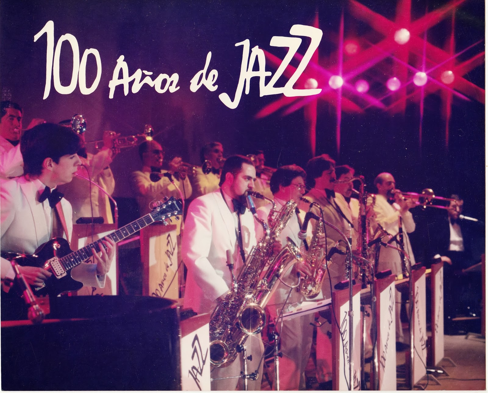 actividad complementaria se presentó el espectáculo 100 años de Jazz, con textos y dirección de Roberto Rodríguez con la participación de la Orquesta Los Satélites y Nonito Pereira haciendo las veces de narrador. Durante dos horas se sucedieron en el escenario fragmentos de famosos temas de jazz de diferentes estilos, interpretados por distintas combinaciones – big band, septeto Dixieland, cuarteto Cool, combo jazz-rock y otras, según la época evocada–.